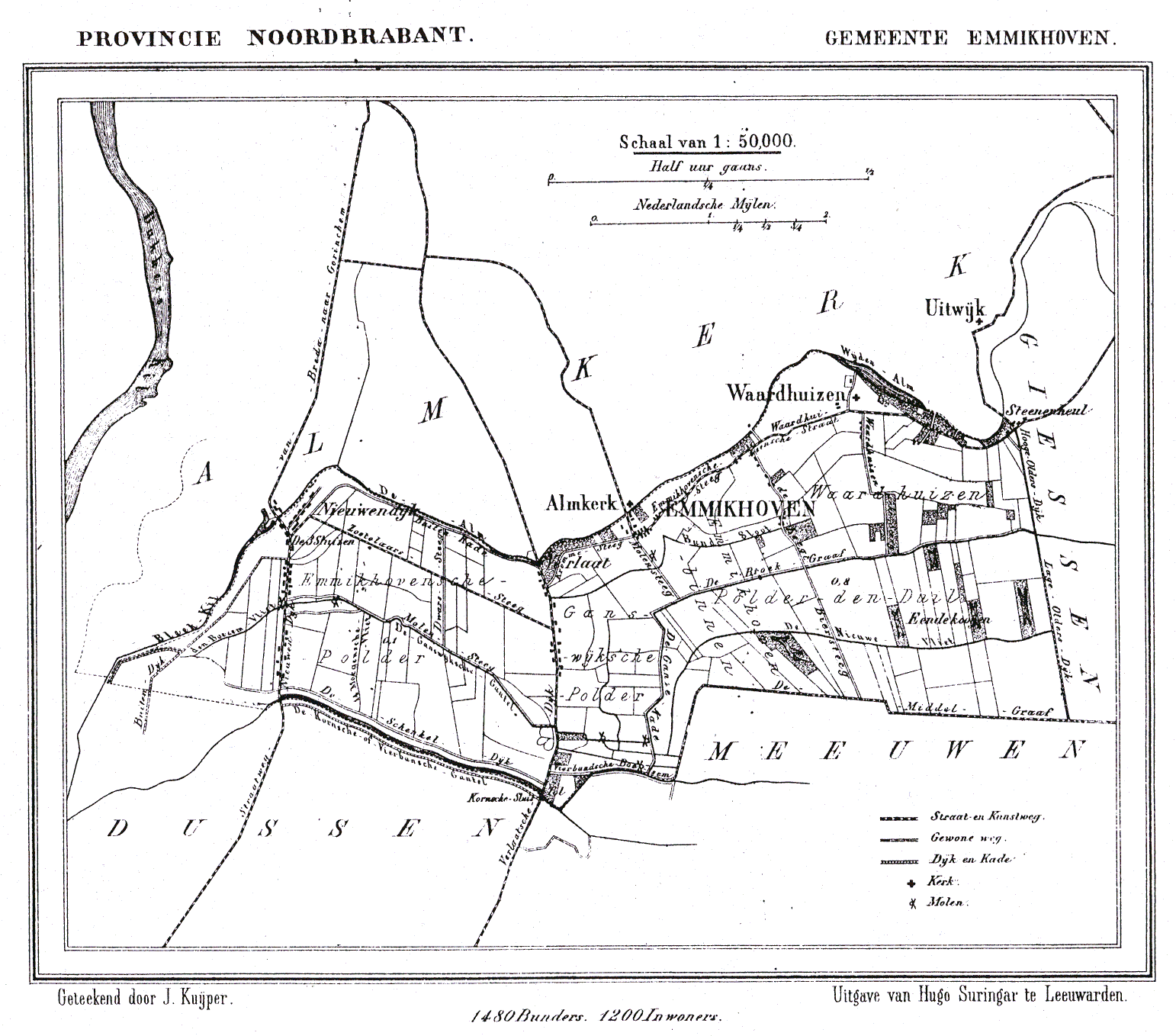 Nederland, Noord-Brabant, Gemeente Emmikhoven